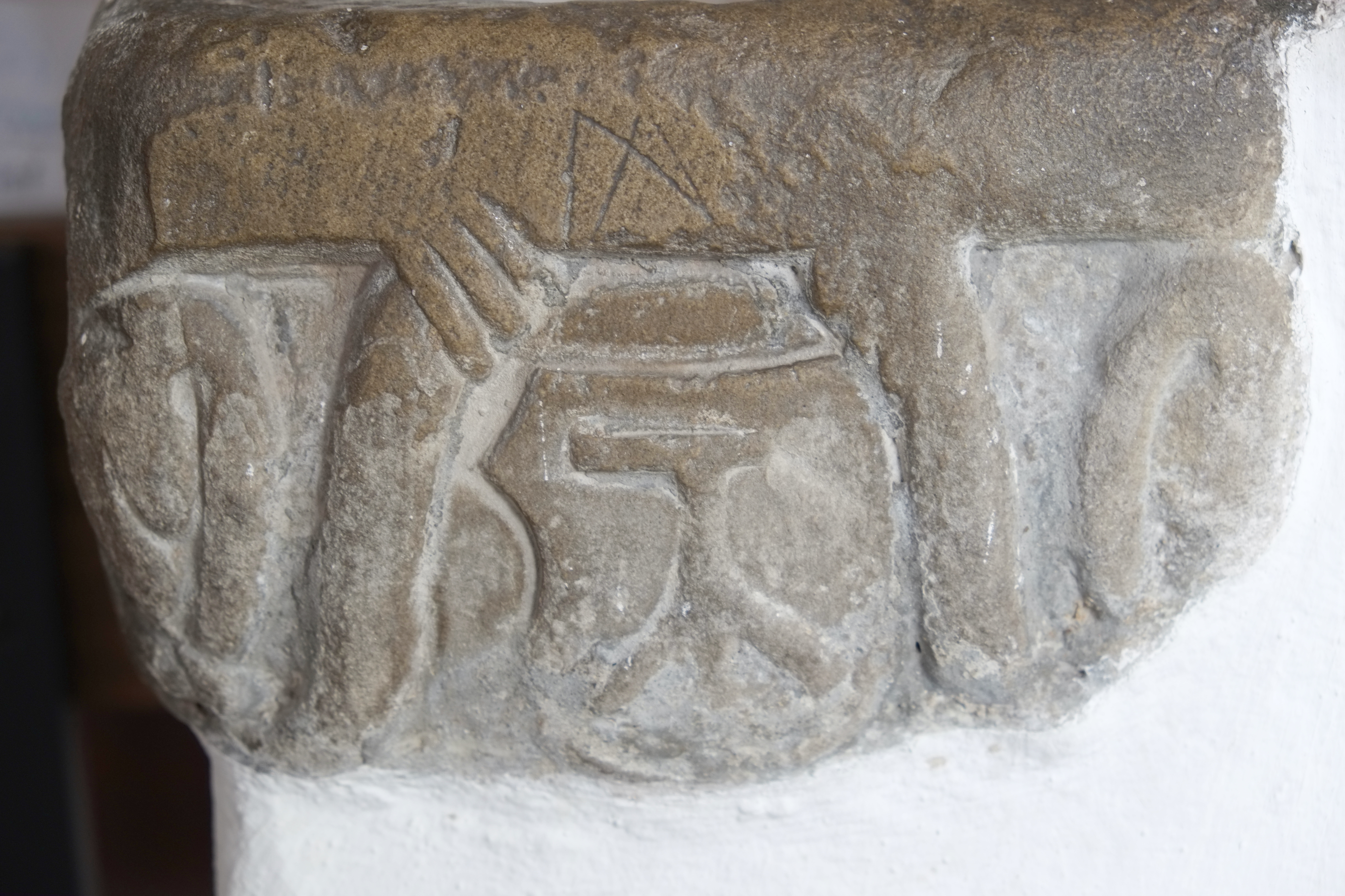 Katholische Pfarrkirche St. Nikolaus in Stadtbergen im Landkreis Augsburg (Bayern, Deutschland); „Wasserwasserbecken in Form eines würfelförmigen Blattkapitells des 13. Jahrhunderts, an der Vorderseite Tartsche mit Steinmetzzeichen, zweites Viertel 16. Jahrhundert“ (Georg Dehio: Handbuch der deutschen Kunstdenkmäler - Bayern III - Schwaben (Bearb: Bruno Bushart, Georg Paula), 2. Auflage, Deutscher Kunstverlag, München 1989, ISBN 3-422-03008-5, Seite 16f.)